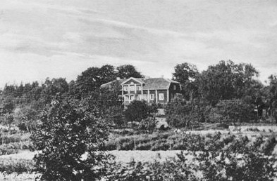 Näringsberg från sydost